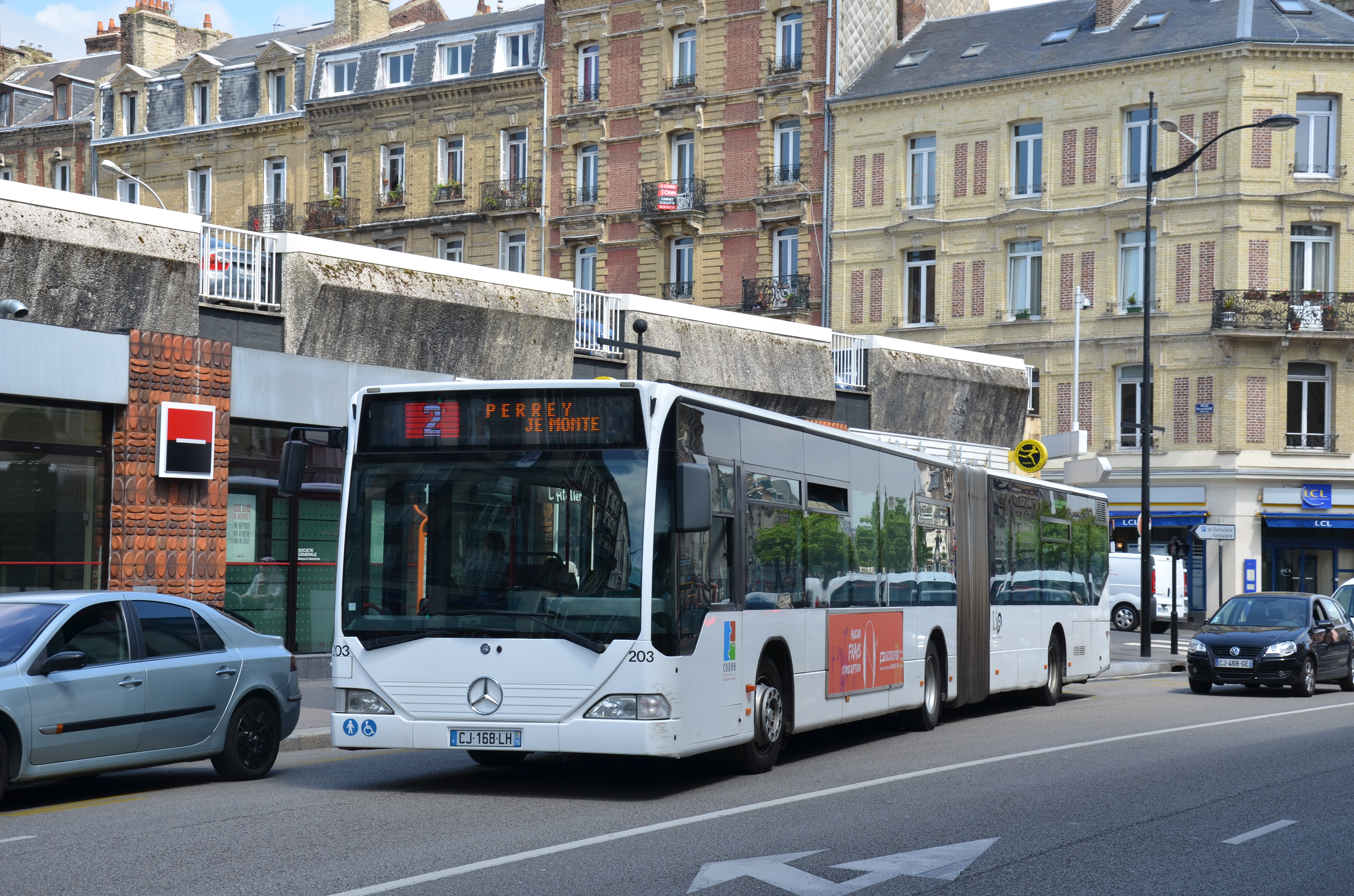 Mercedes Citaro G n°203 sur la ligne 2 du réseau LiA du Havre, quittant l'arrêt René Coty.